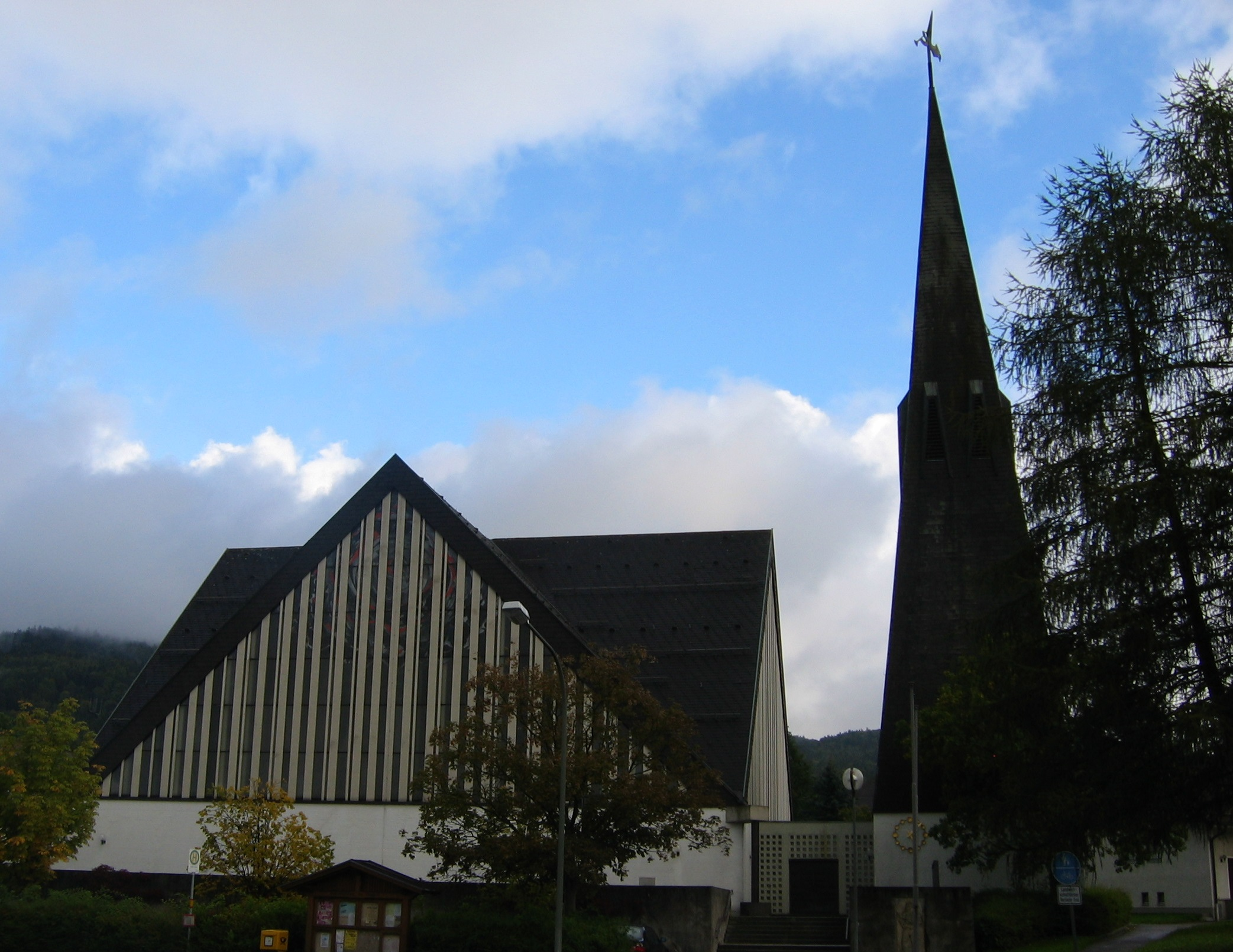 Kath. Pfarrkirche St. Bartholomäus Geigant